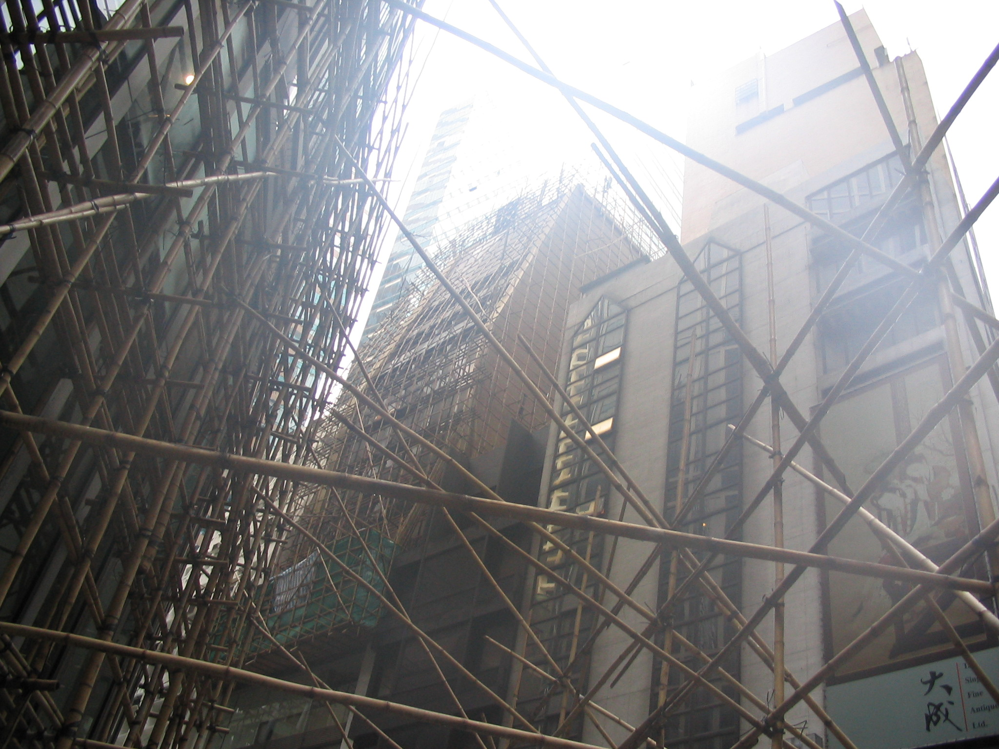 Bamboo scaffolding, Hong Kong.